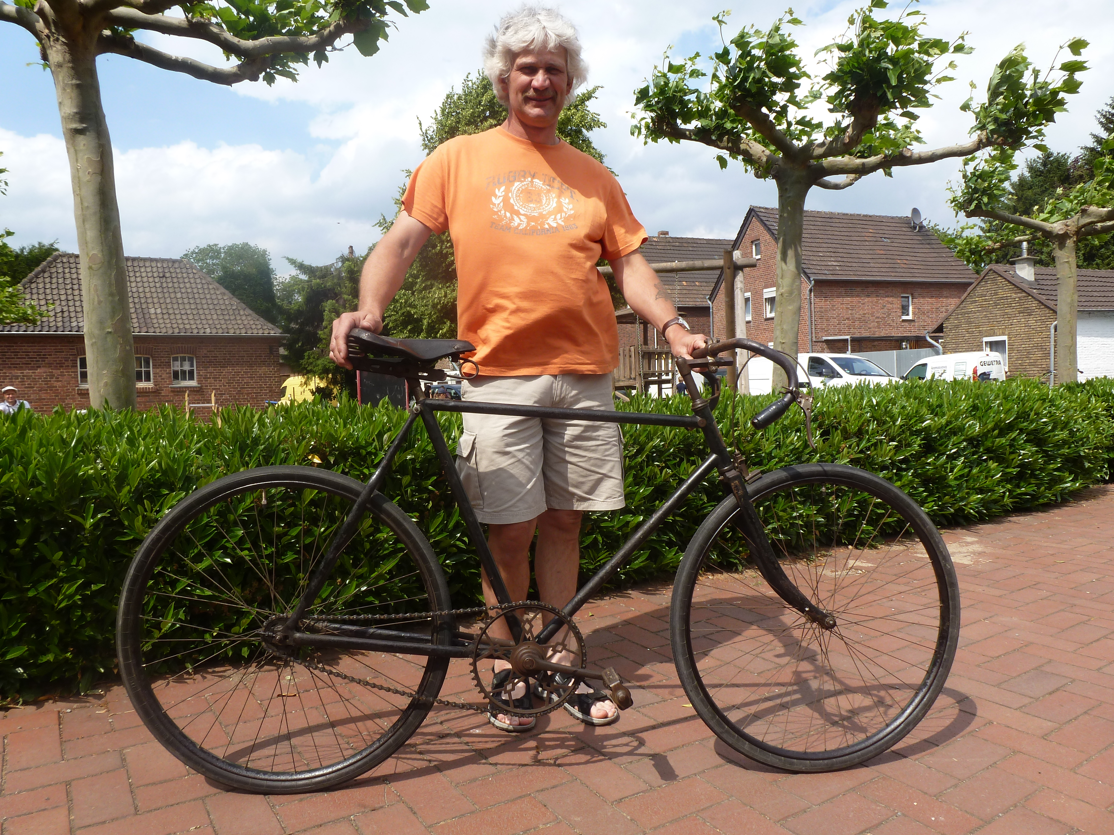 Opel-Rad Halbrenner vermutlich von ca. 1910, im Besitz des Sammlers Gerd Jajschik